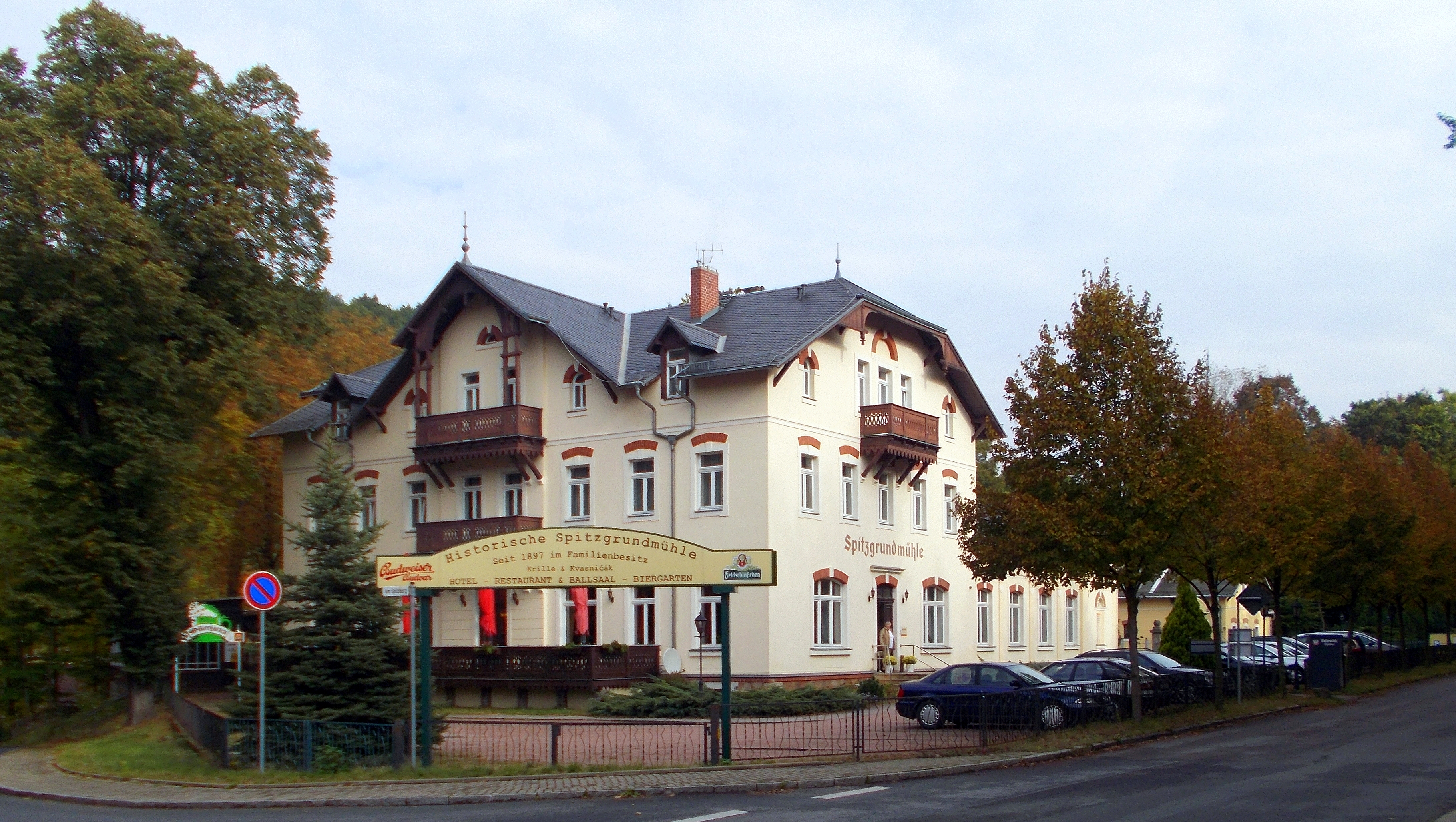 Die historische Spitzgrundmühle bei Coswig.